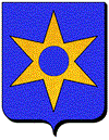 Premier blason connu de la famille du Buat, avant 1190 : d'azur à la molette d'or. Il a peut-être continué à être porté par des branches cadettes au XIIème siècle - XIIIème siècle. En héraldique, la molette représente celle des anciens chevaliers (les rois faisaient mettre des éperons aux gentilshommes et écuyers qu'ils créaient chevaliers). La molette s'est transformée en escarboucle à une date inconnue, mais avant 1190, pour fait d'armes.